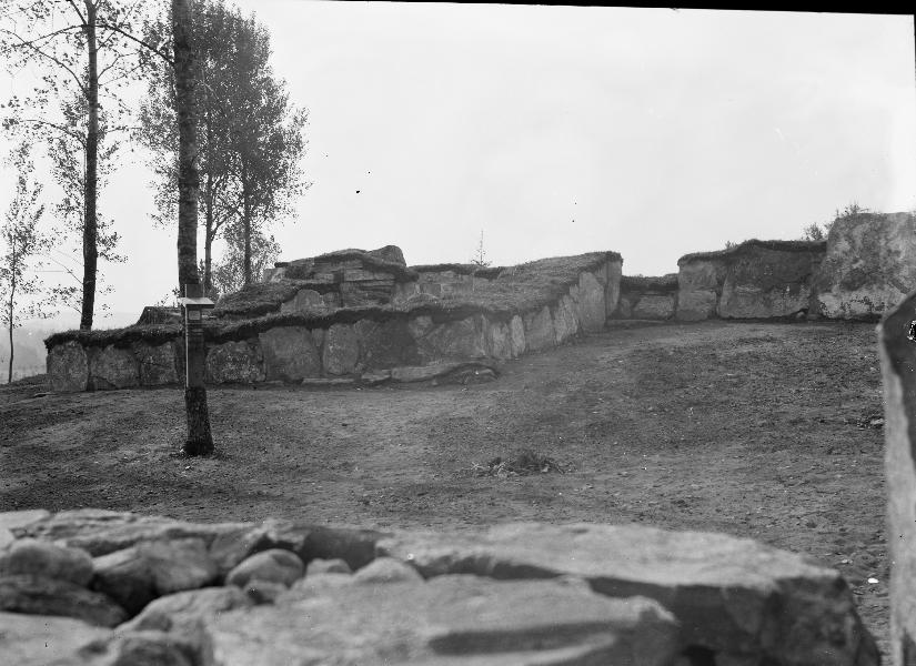 Sakristian. Efter konservering. Kategori: (01) Exteriörer, detaljerSakristian. Efter konservering.